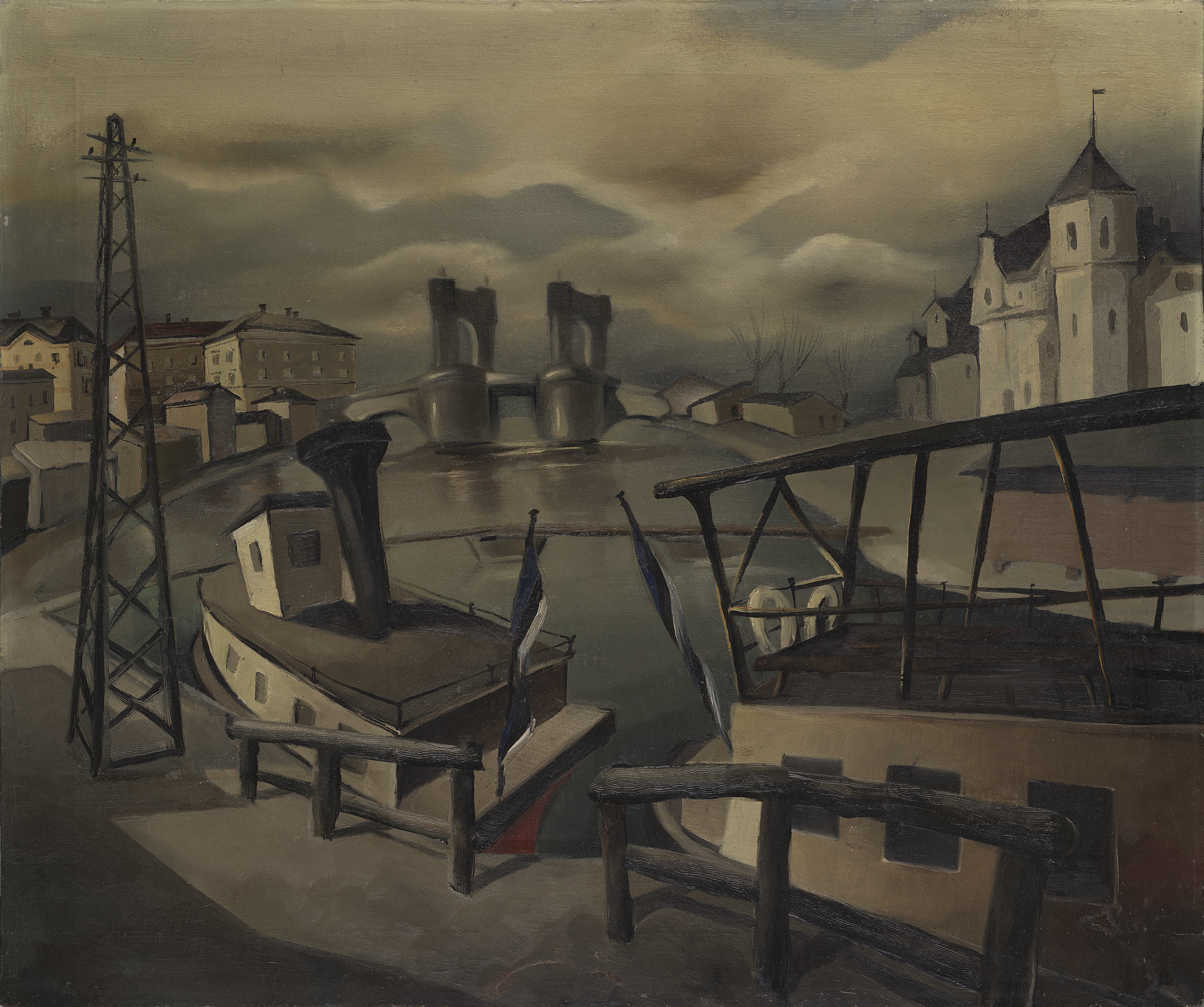 "Tartu kivisild". 1931. Õlimaal lõuendil. 66,0 x 78,8 cm. This image on crowdsourcing geotagging platform Ajapaik